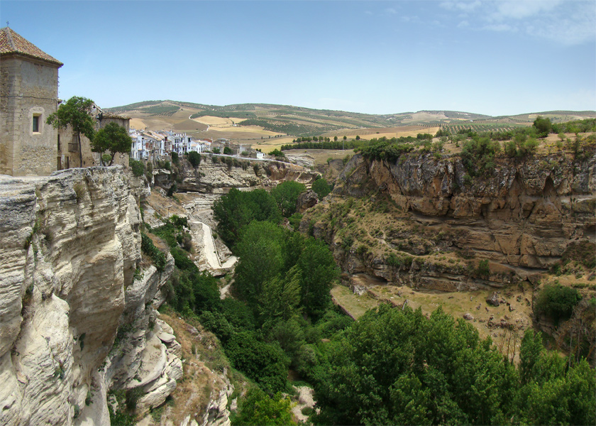 Alhama de Granada, Andalucía, España.